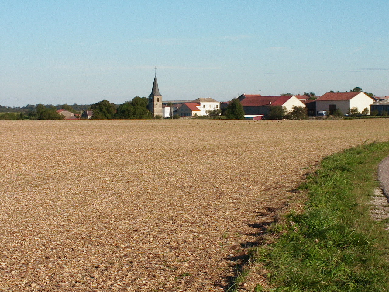 Village de Badonvilliers-Gérauvilliers - vue du village depuis la route de Rosières-en Blois Photo prise par F5ZV à l'automne 2005 Licensing Catégorie:Image de commune de la Meuse